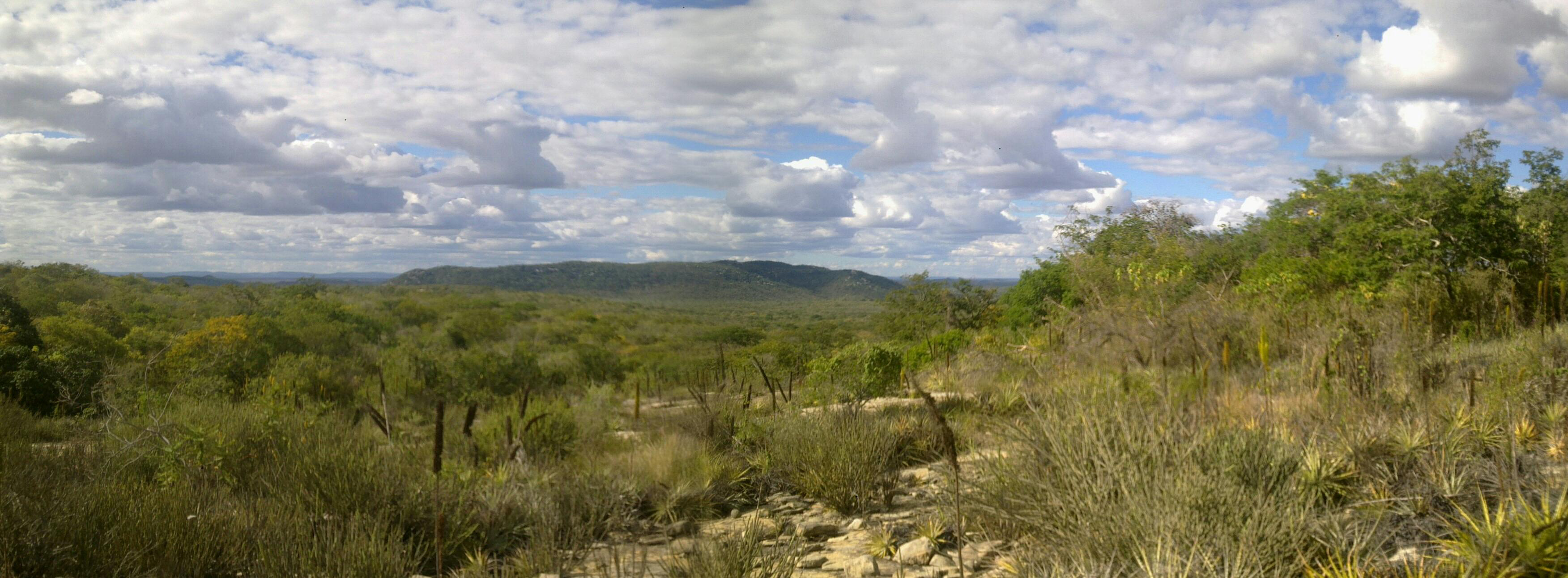 Lajedo do Aveloz, formação rochosa situada na Caatinga Paraibana.